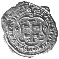 poečat smižian